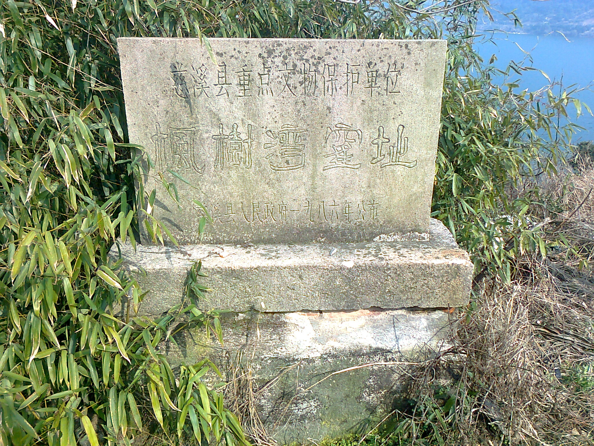 中文（中国大陆）: 里杜湖枫树湾越窑遗址（碑)